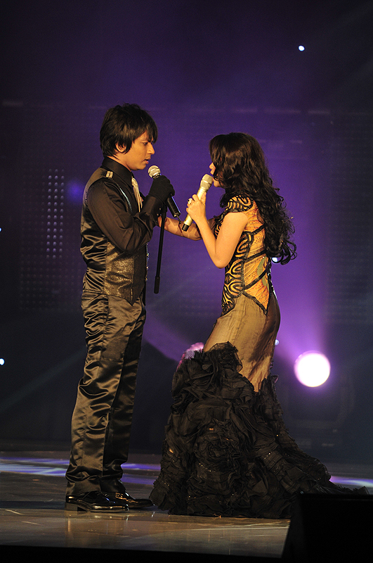 Anugerah Industri Muzik 16 (AIM 16) @ Dewan Merdeka, PWTC 2 May 2009